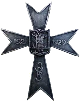 Replika odznaki pułkowej 3 pułku saperów w Wilnie. Odznaka została zatwierdzona Dz. Rozk. MSWojsk nr 1 z 1929 r. Jest posrebrzana i oksydowana, ma wymiary 50 x 40 mm. W centrum krzyża znajduje się tarcza z herbem Wilna.